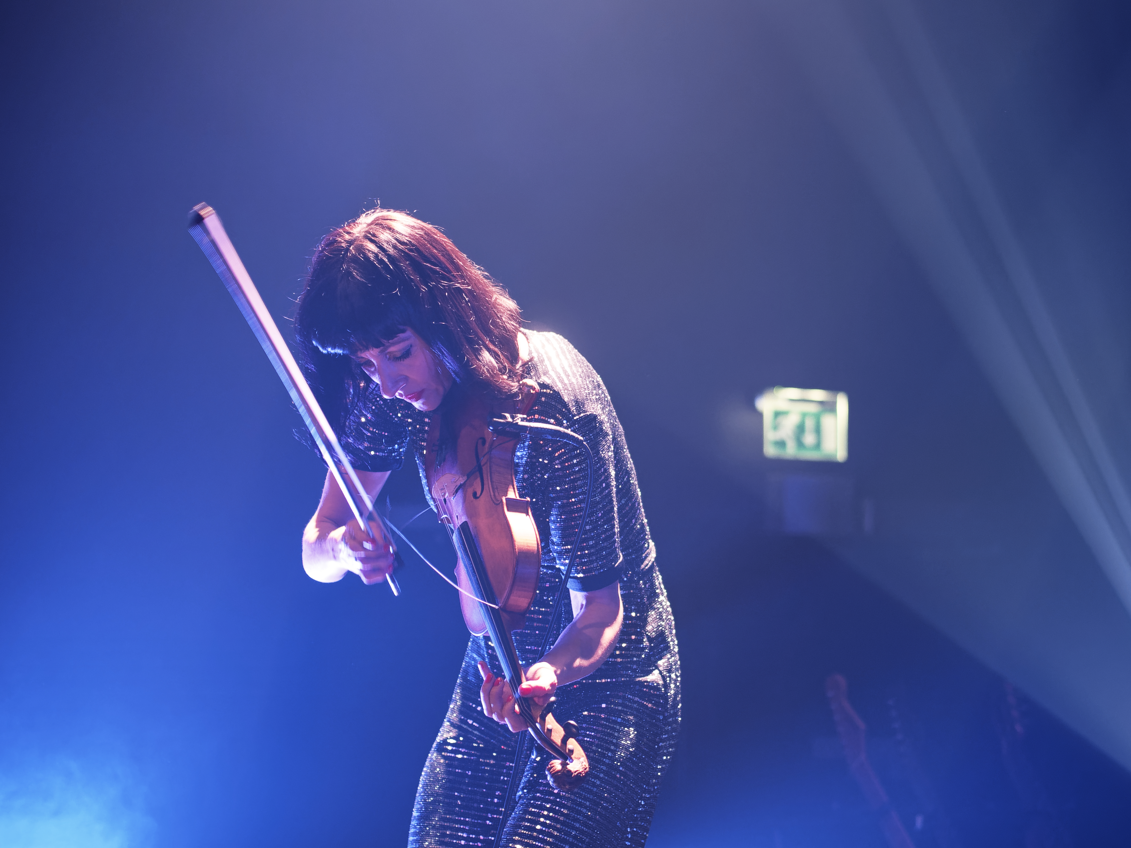 Concert van Oi Va Voi in TivoliVredenburg in Utrecht op 14 februari 2019